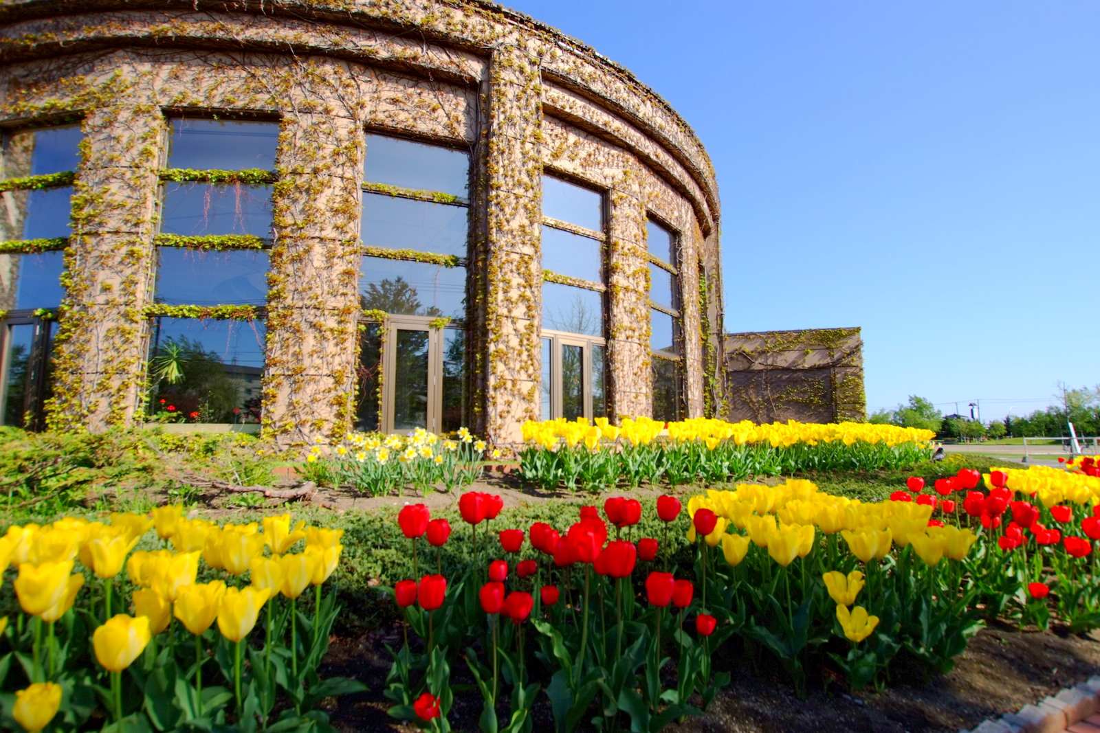 農試公園 （Noshi Park）